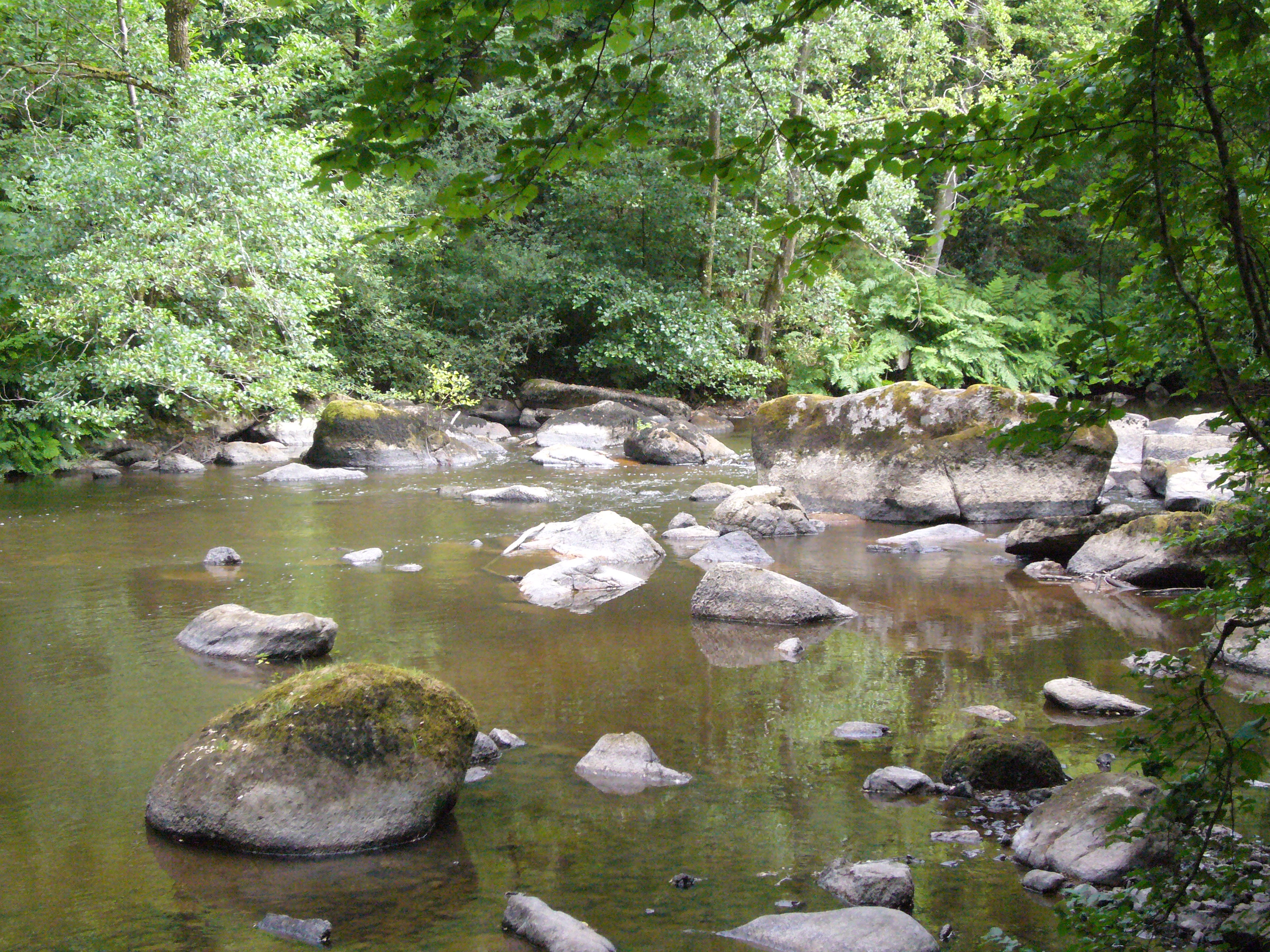 La Glane au site Corot (Saint-Junien, Haute-Vienne, France)